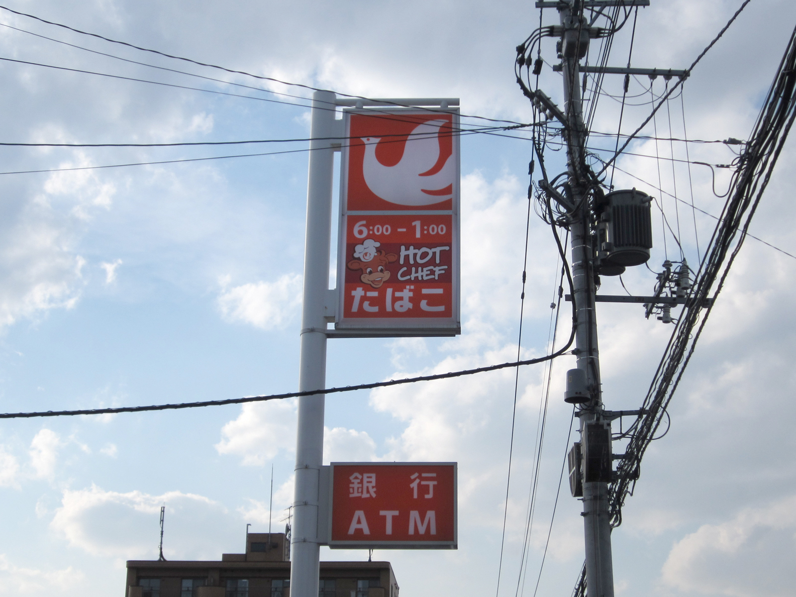 セイコーマートのホットシェフの表（北海道札幌市豊平区）